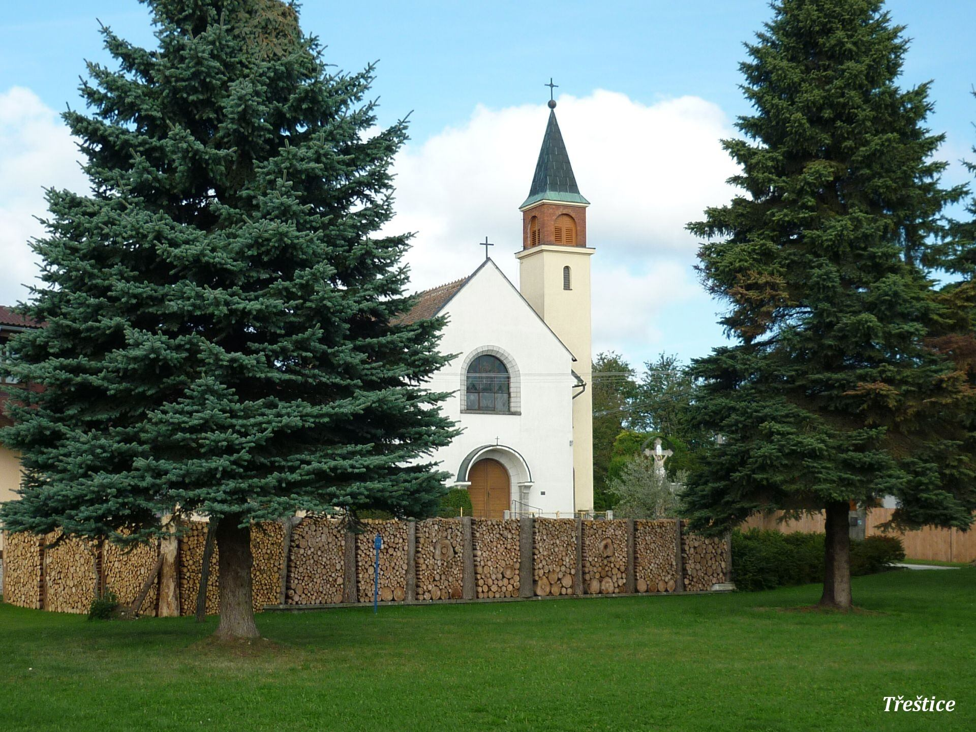 Kaple sv. Antonína Paduánského v Třeštici